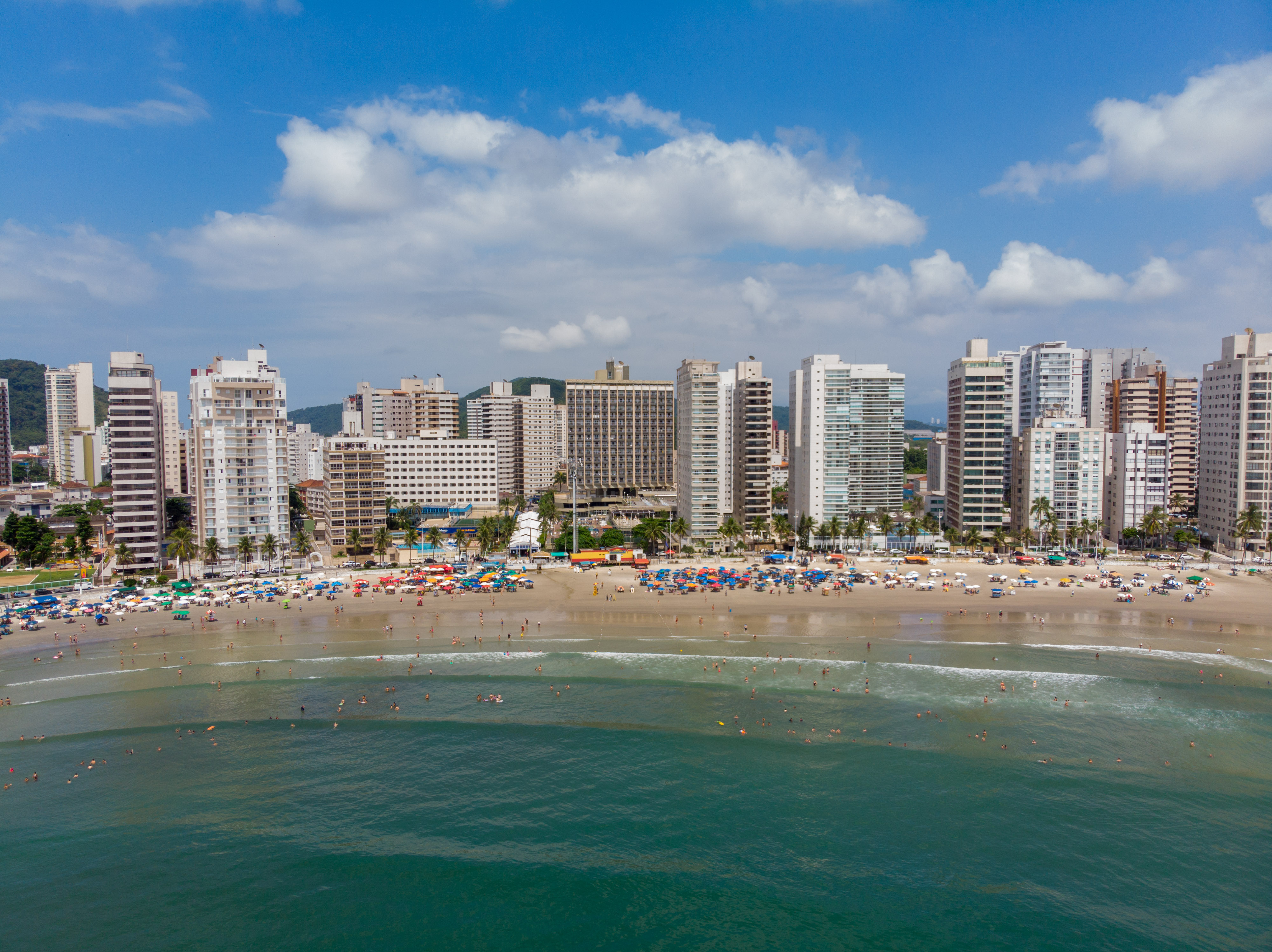 Operação Praia Segura no Guarujá.Data: 22/01/2019. Foto: Governo do Estado de São Paulo